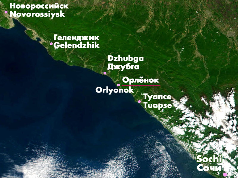 Karta_bereg